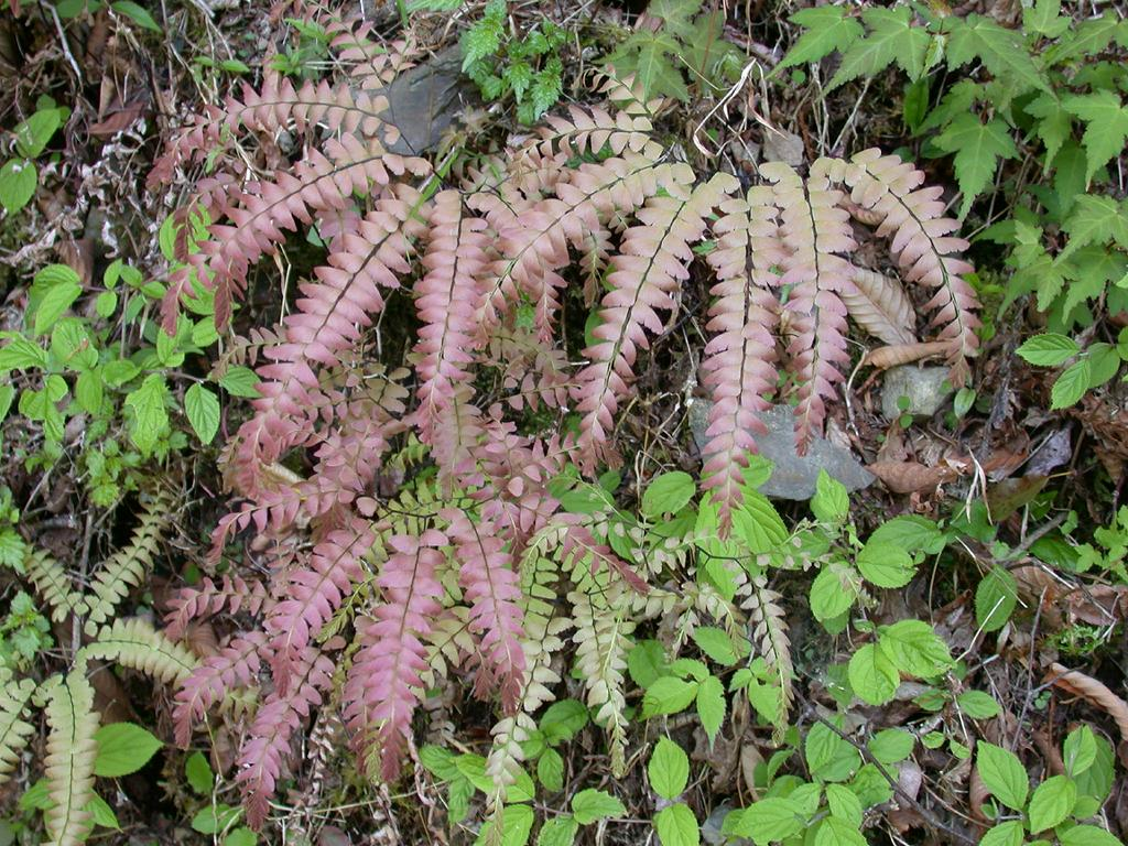 Adiantum pedatum(Parkeriaceae) Japanese name:Hinokisida Date;2007,05;Koya town, Wakayama prefecture, Japan Author;Keisotyo